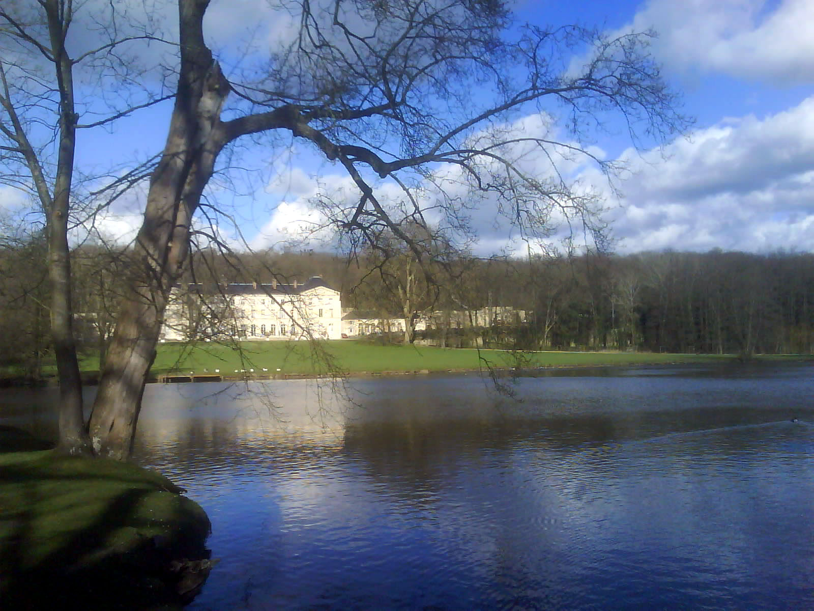 Château de Grouchy et étang, en premier plan, vus du Parc.